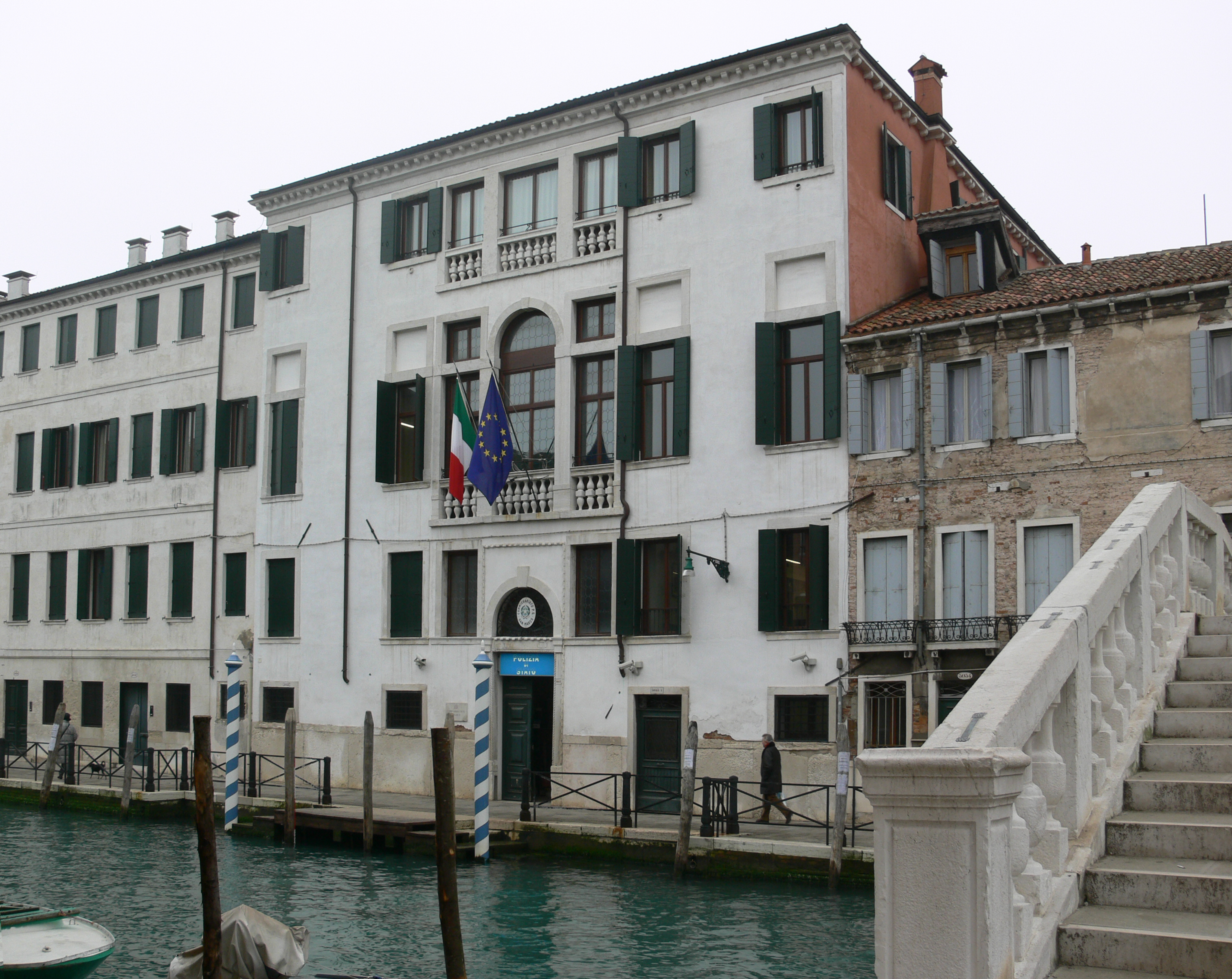 Questura (police department), Fondamenti di San Lorenzo, Venezia, Italia (made famous by Donna Leon's Commissario Brunetti novels)